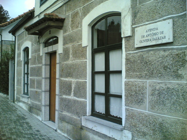 Main street of Vimieiro, Santa Comba Dão, Portugal